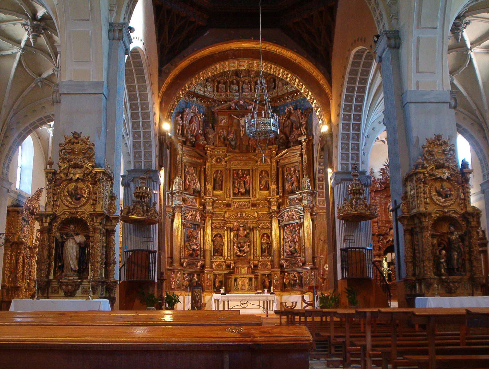 Interior de la Iglesia de Santa María, Alaejos, Valladolid, España